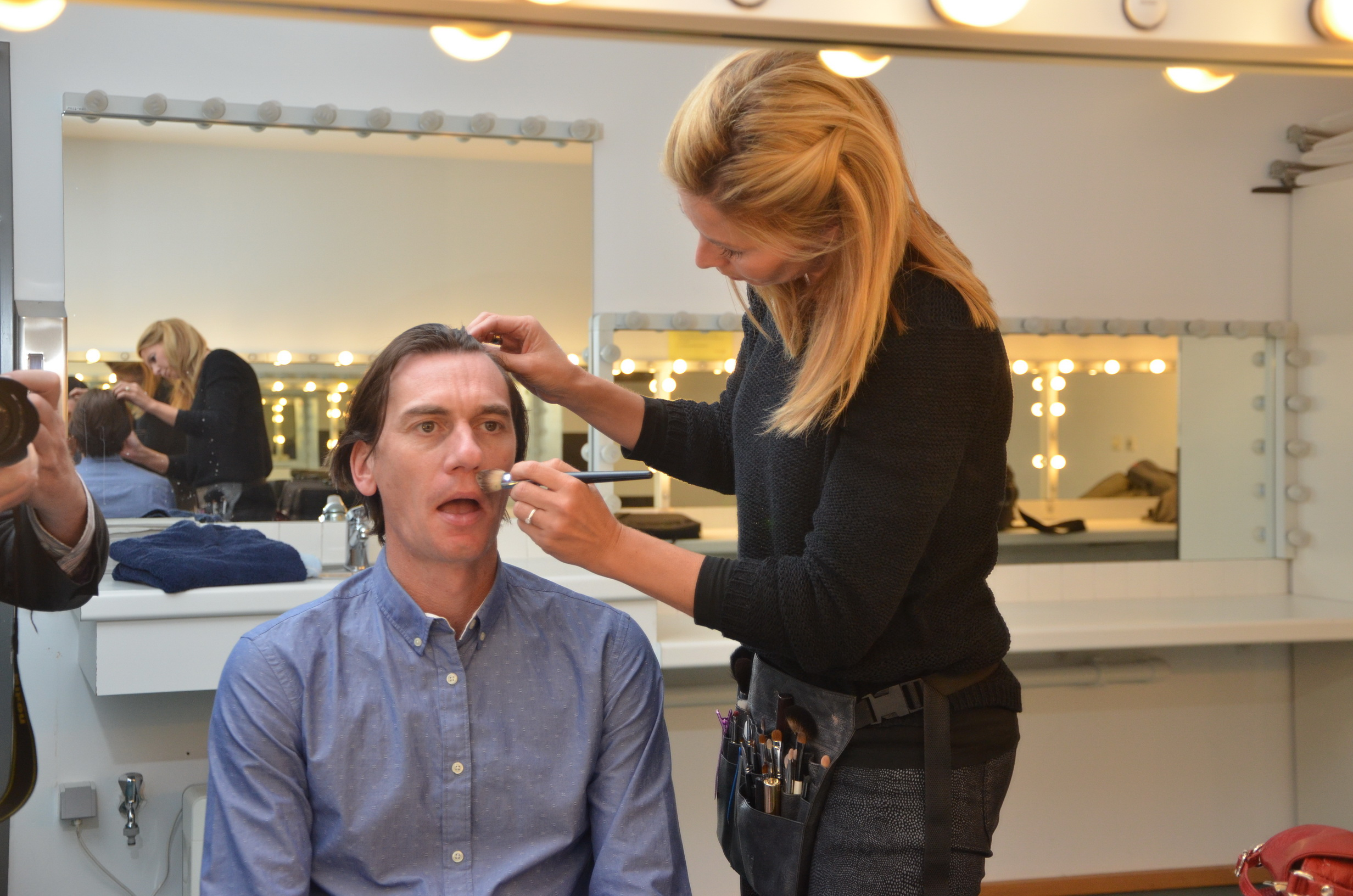 Bert Gabriëls.